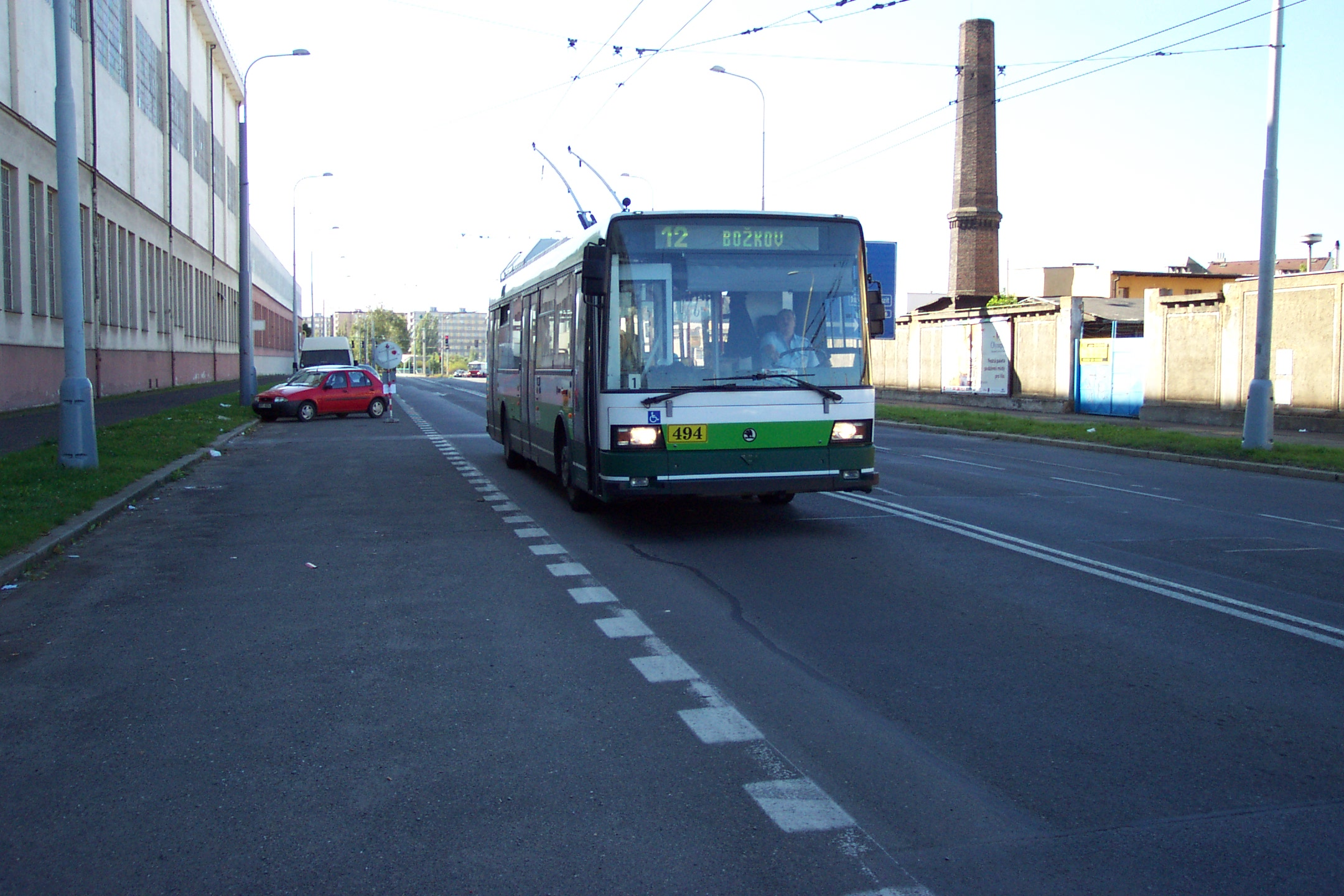 Plzeň, trolleybus type 21Tr - Plzeň, trolejbus typu 21Tr